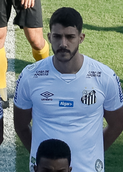 (Santos - SP, 16/11/2019) Partida de futebol Santos e São Paulo na Vila Belmiro. Foto: Isac Nóbrega/PR